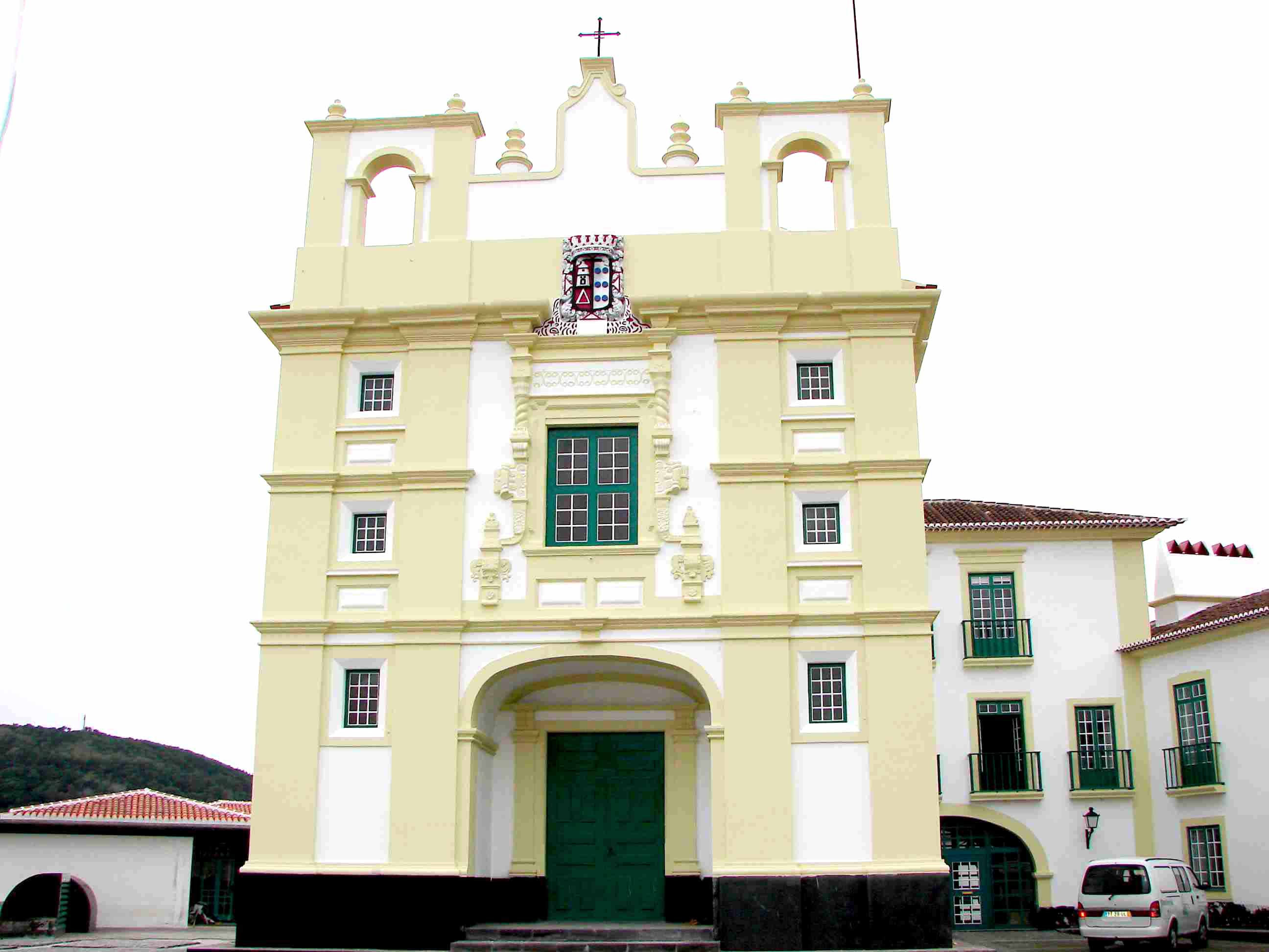 Igreja do antigo Orfanato de Beato João Baptista Machado, actual Solar dos Remédios, casa do Provedor das Armadas, Angra do Heroísmo, ilha Terceira, Açores, Portugal.